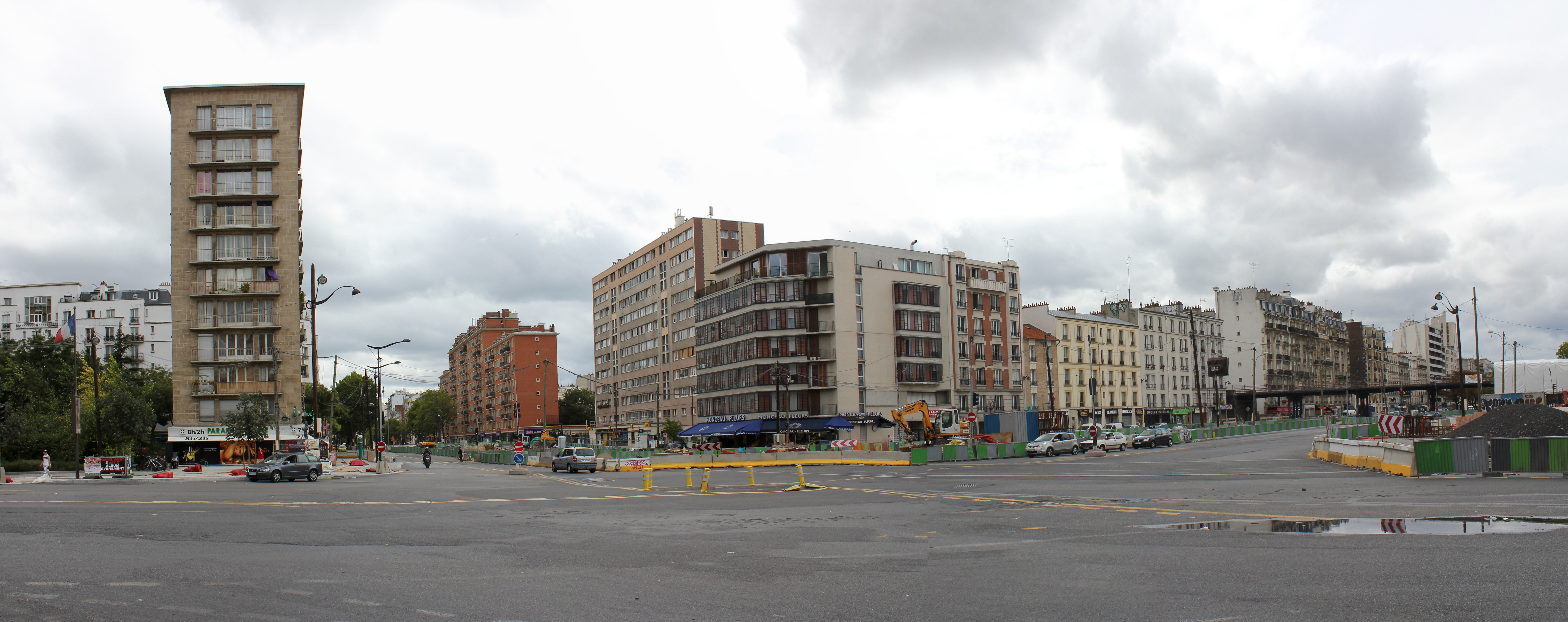 Porte de Vincennes durant les travaux du tramway T3, dans le 20e arrondissement de Paris, France